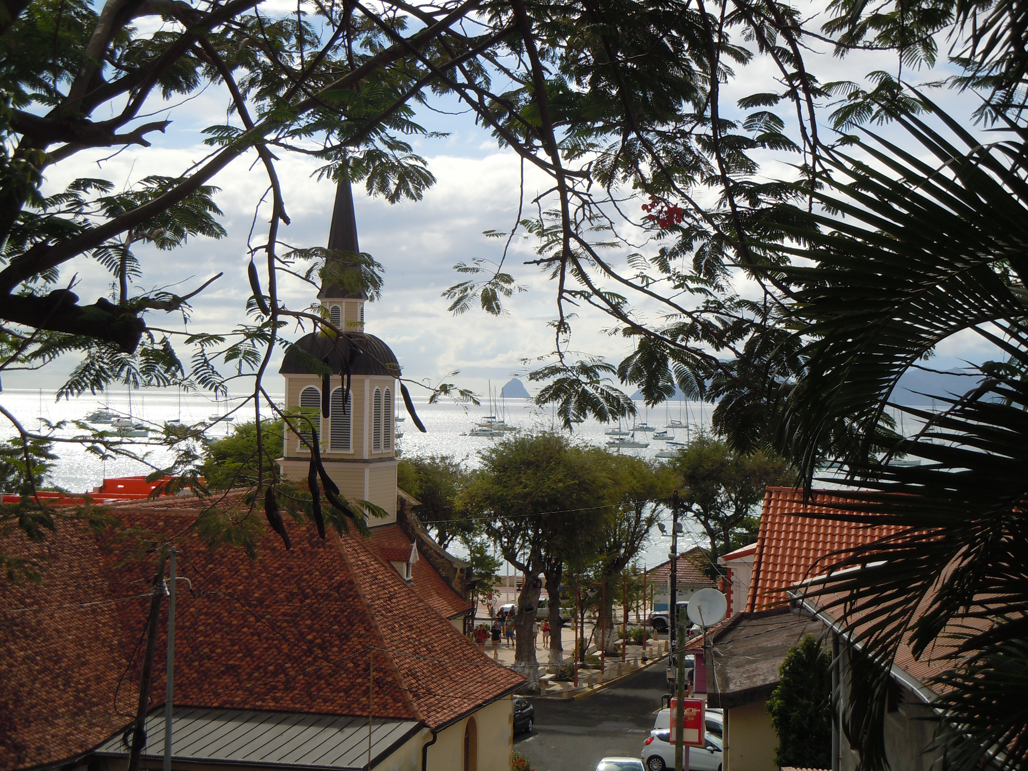 Église Notre-Dame de Sainte-Anne depuis le Chemin de Croix